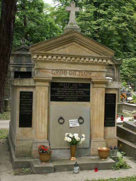 Krakow in Poland from Polish Wikipedia